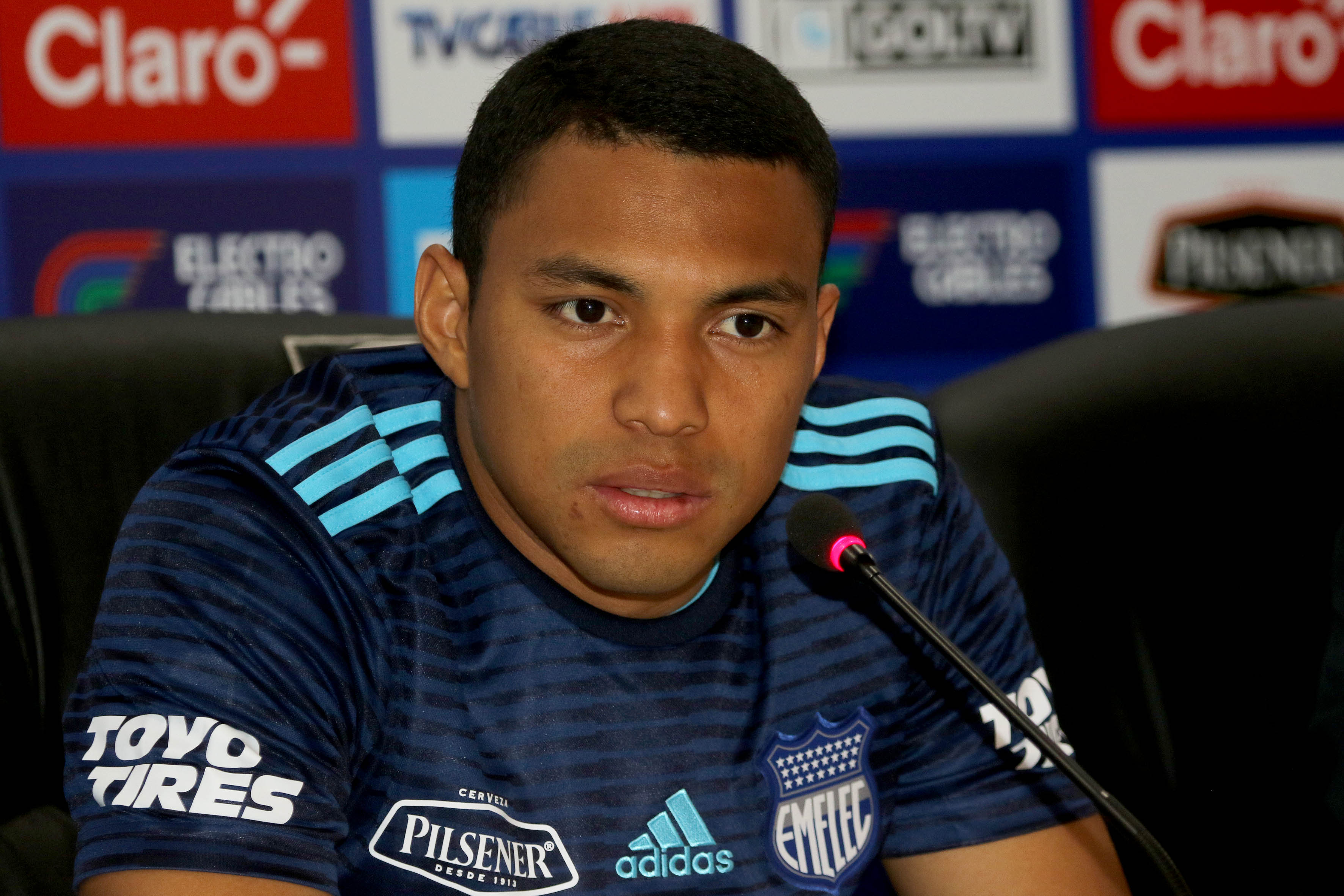 Guayaquil, miércoles 28 de febrero del 2018 (Andes).-En la sala de prensa del Estadio George Capwell fue presentado oficialmente Jefferson Montero, nuevo refuerzo de Emelec Foto:Andes/César Muñoz